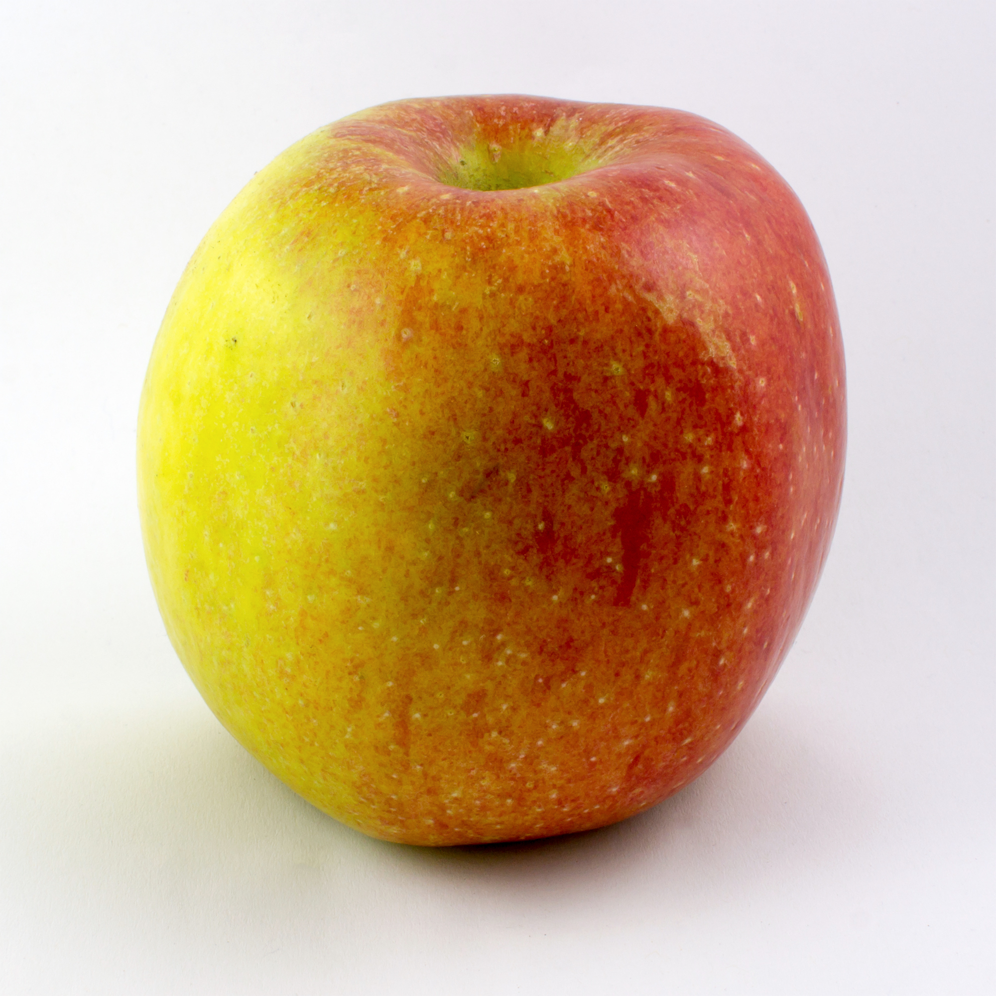 Apfelsorte Braeburn